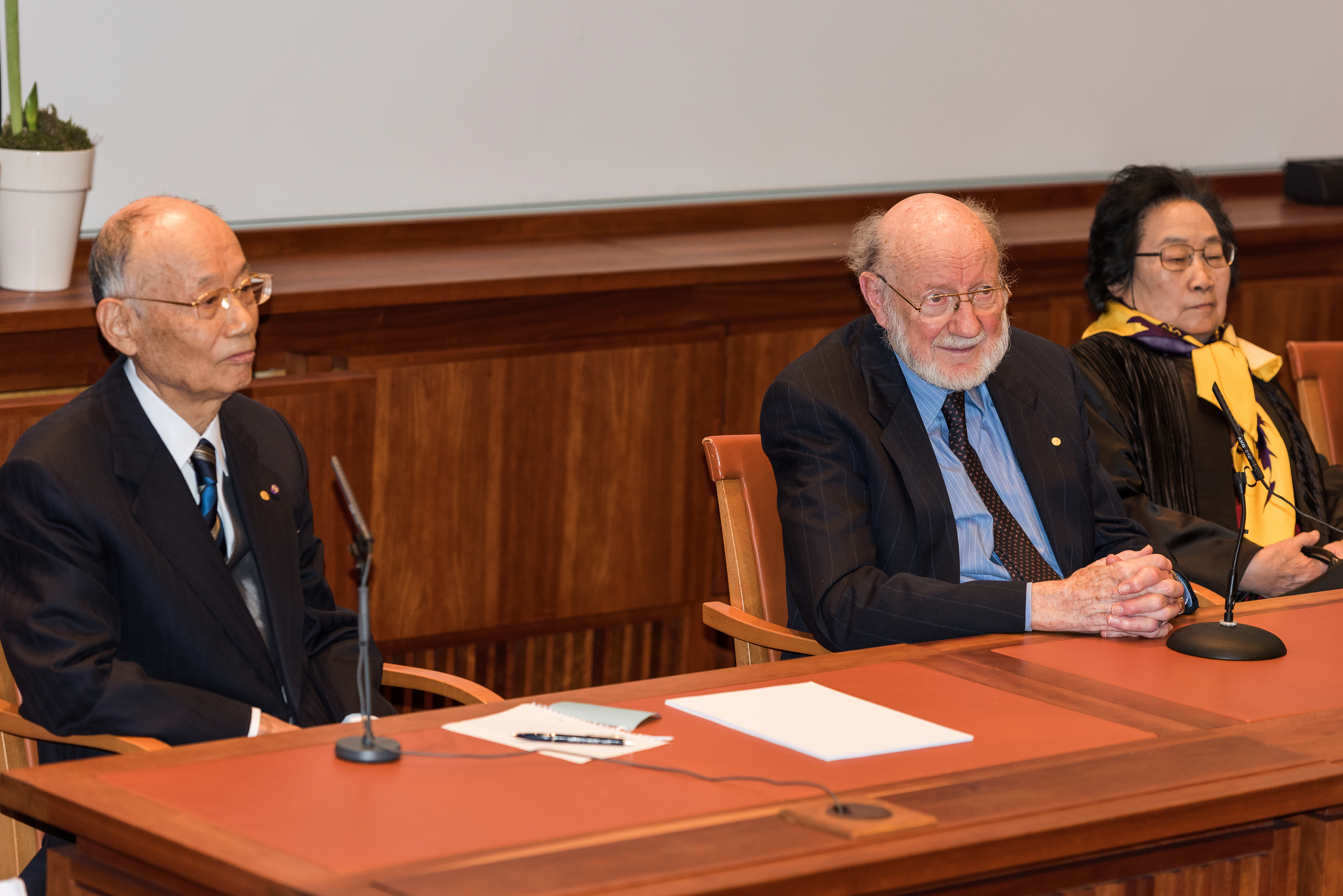 Nobel Laureates in medicin 2015 تو يويو الحائزة على جائزة نوبل في الطب